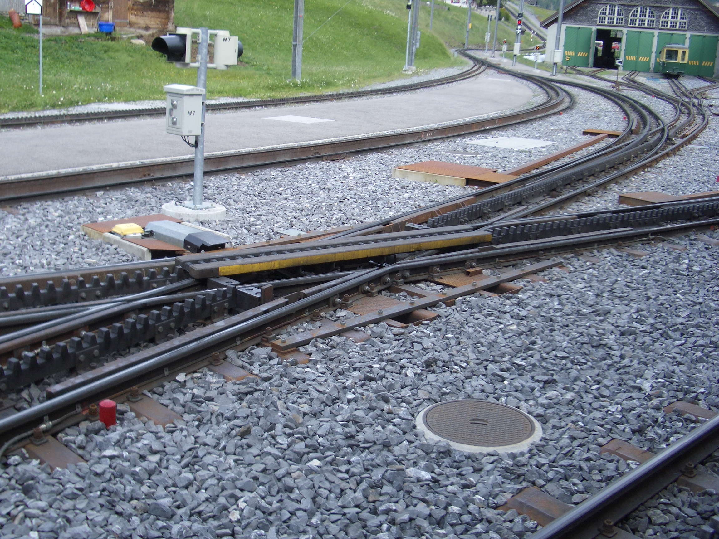 Kreuzung mit beweglicher Zahnstange im Bahnhof Grindelwald Grund